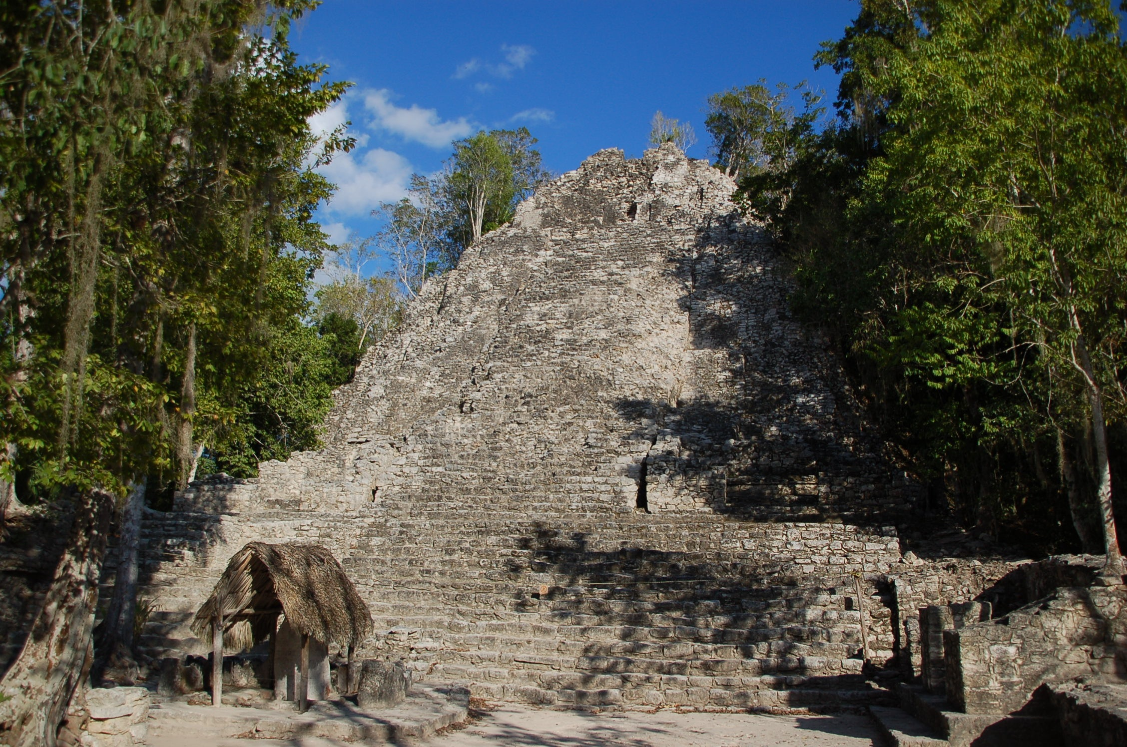 Site archéologique de Coba, Yucatán, Mexique